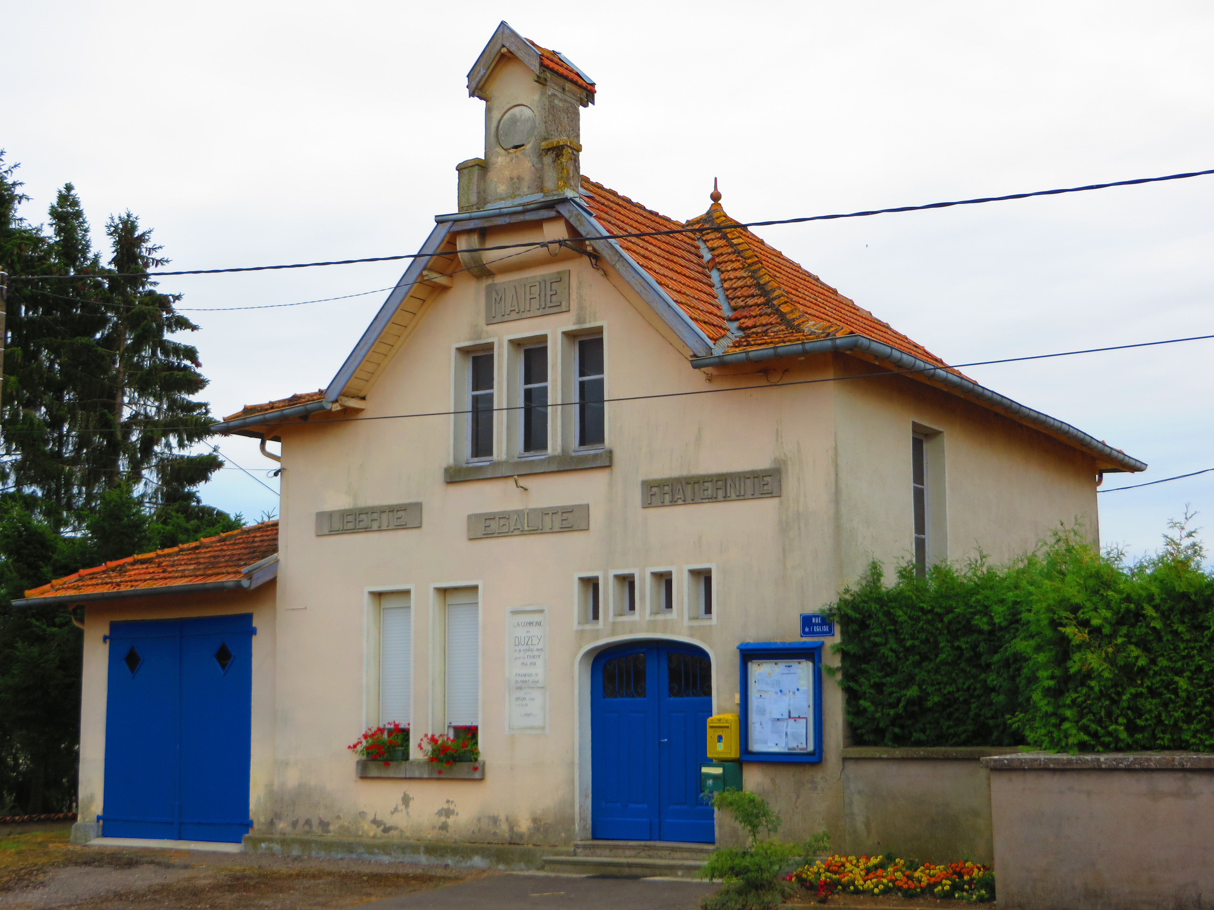 Duzey La mairie